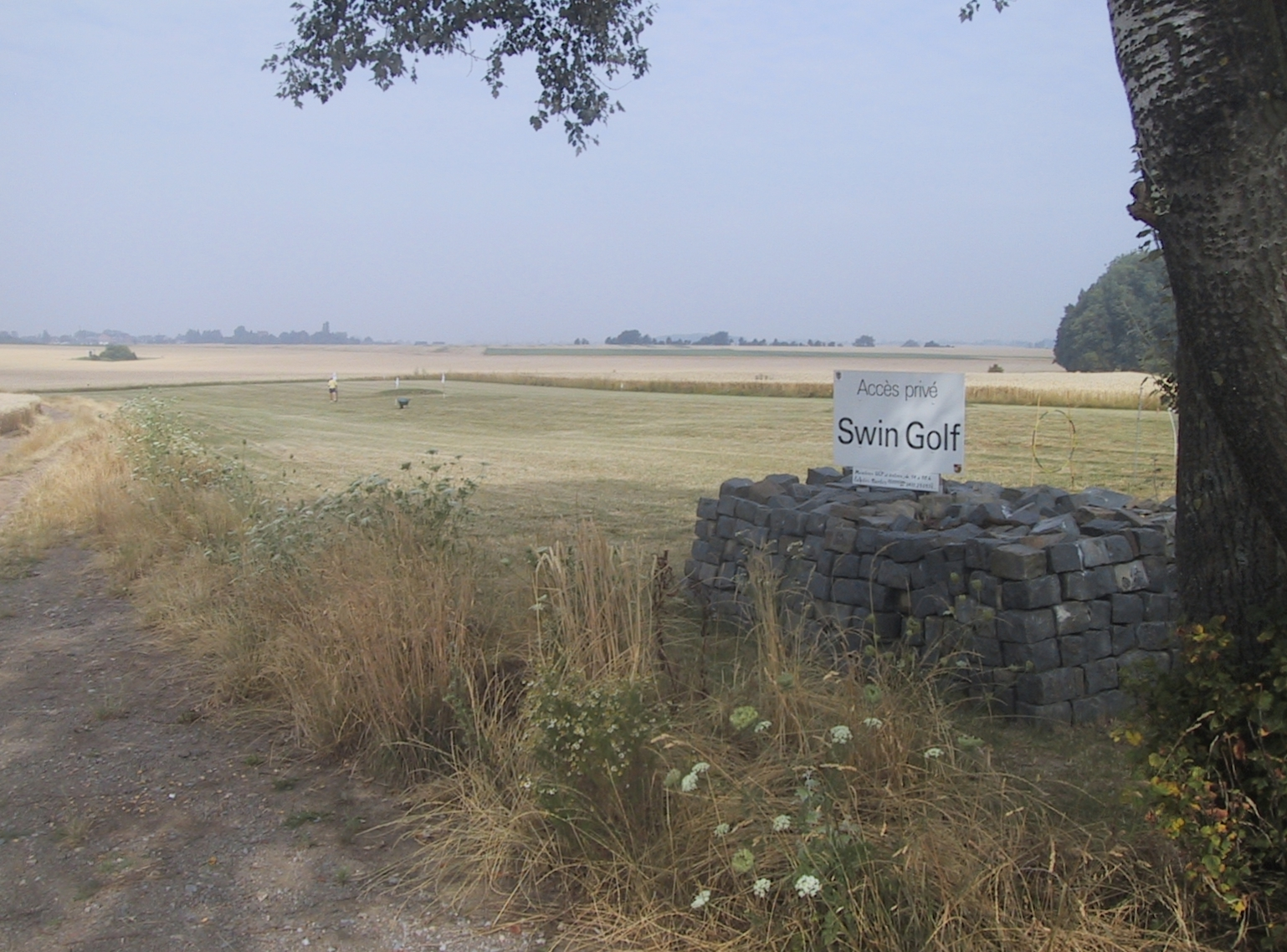 Terrain de Swin Golf à Alleur, Belgique